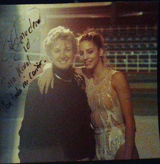 La fotógrafa española Karol Otero junto a la gimnasta Almudena Cid en el Palacio de Deportes de Oviedo durante una exhibición de Almudena el 15 de diciembre de 2001.